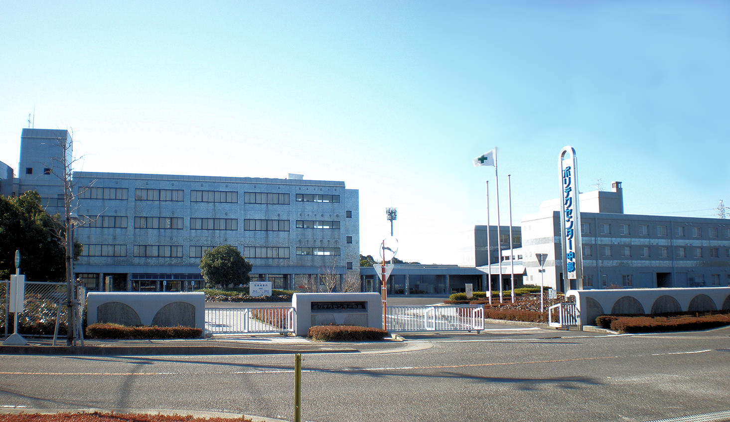 愛知県小牧市にあるポリテックセンター中部（独立行政法人雇用・能力開発機構愛知センター）のパノラマ写真（ソフトウェアにて合成）。